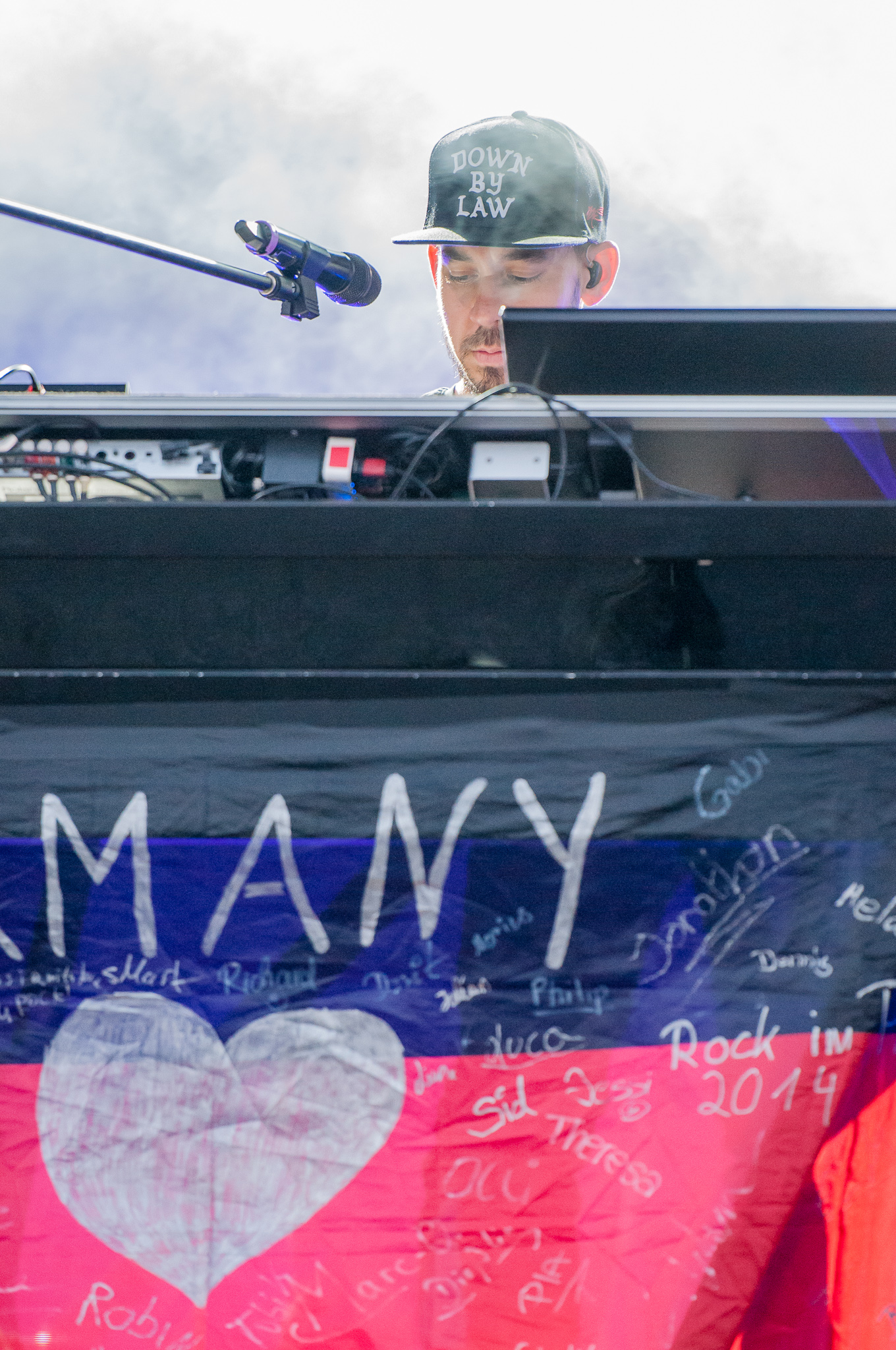 ARGO-Konzerte,Centerstage,Konzert,Linkin Park,Livekonzert,Livemusik,Mike Shinoda,Musik,RiP,Rock im Park 2014